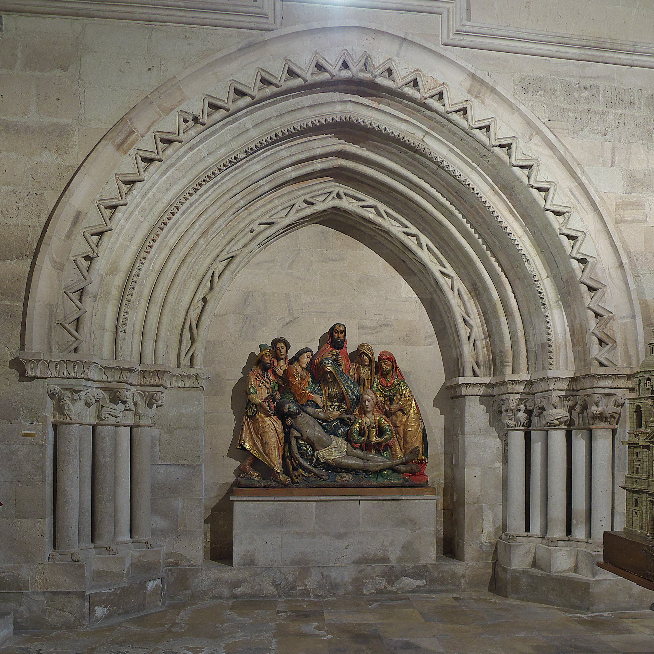 Catedral de Nuestra Señora de la Asunción de Valladolid. Portada gótica del claustro de la antigua Colegiata de Valladolid. Importante muestra del gótico-cisterciense.